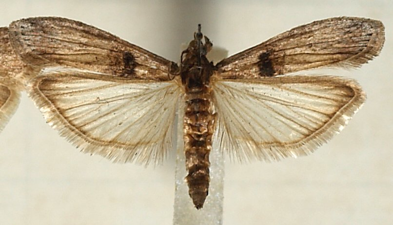 Alispa angustella